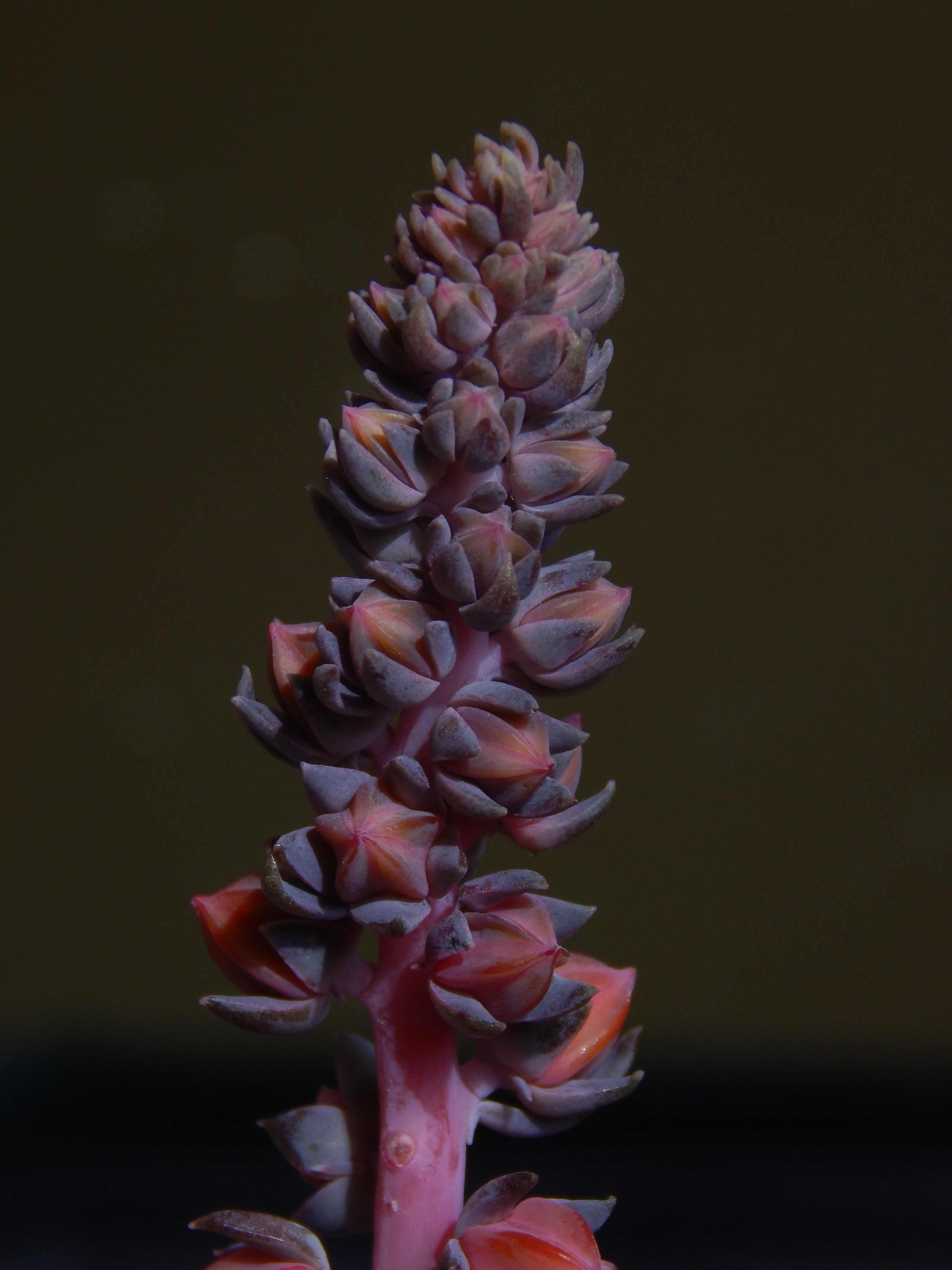 flores